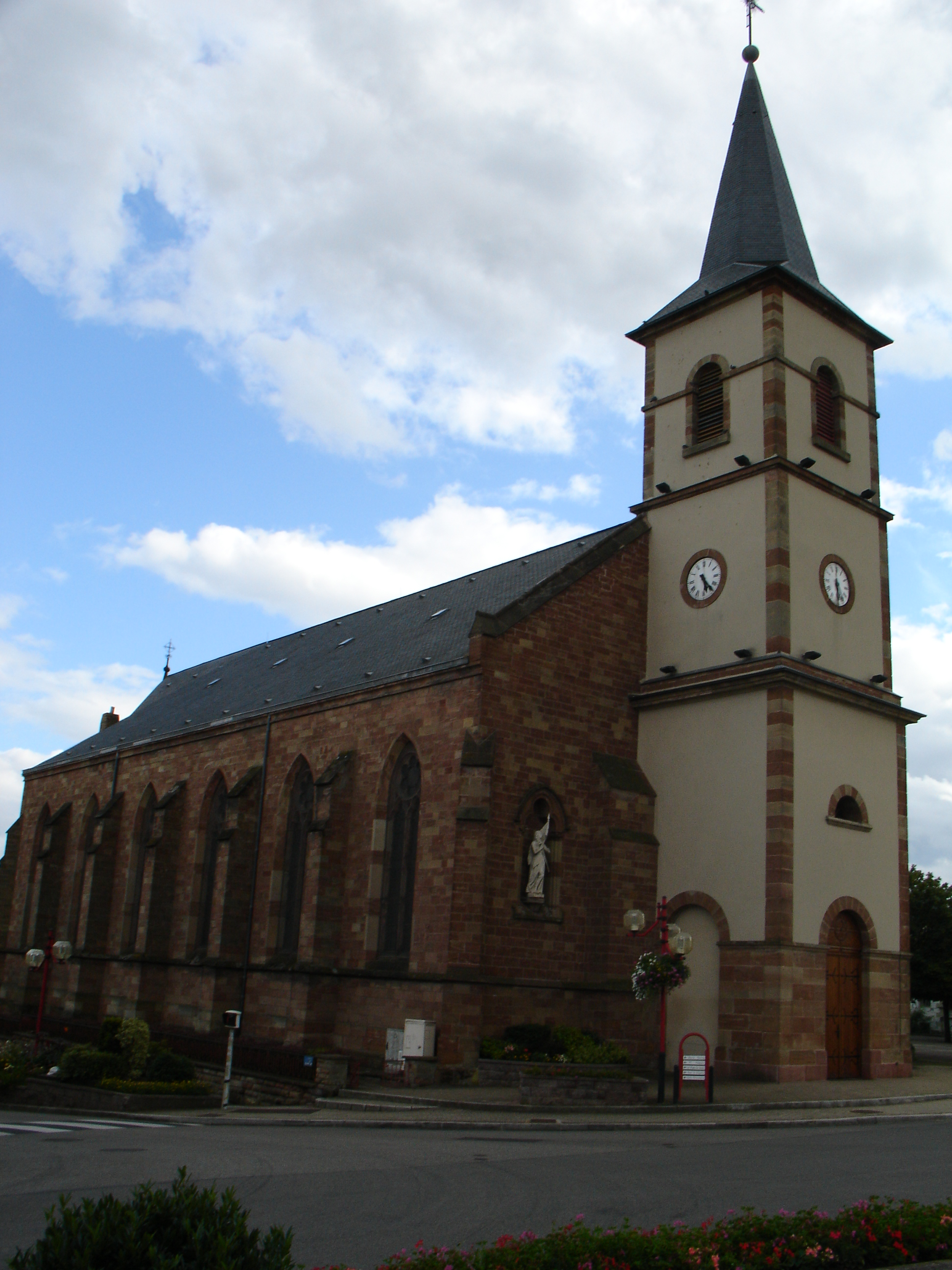 L'Église Sainte-Croix de Porcelette.